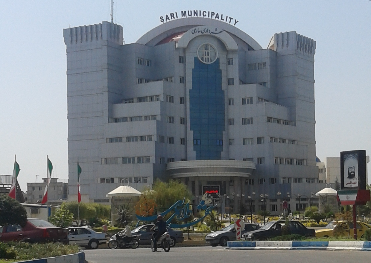 ساری ِجدید شهرداری ِبـِنا